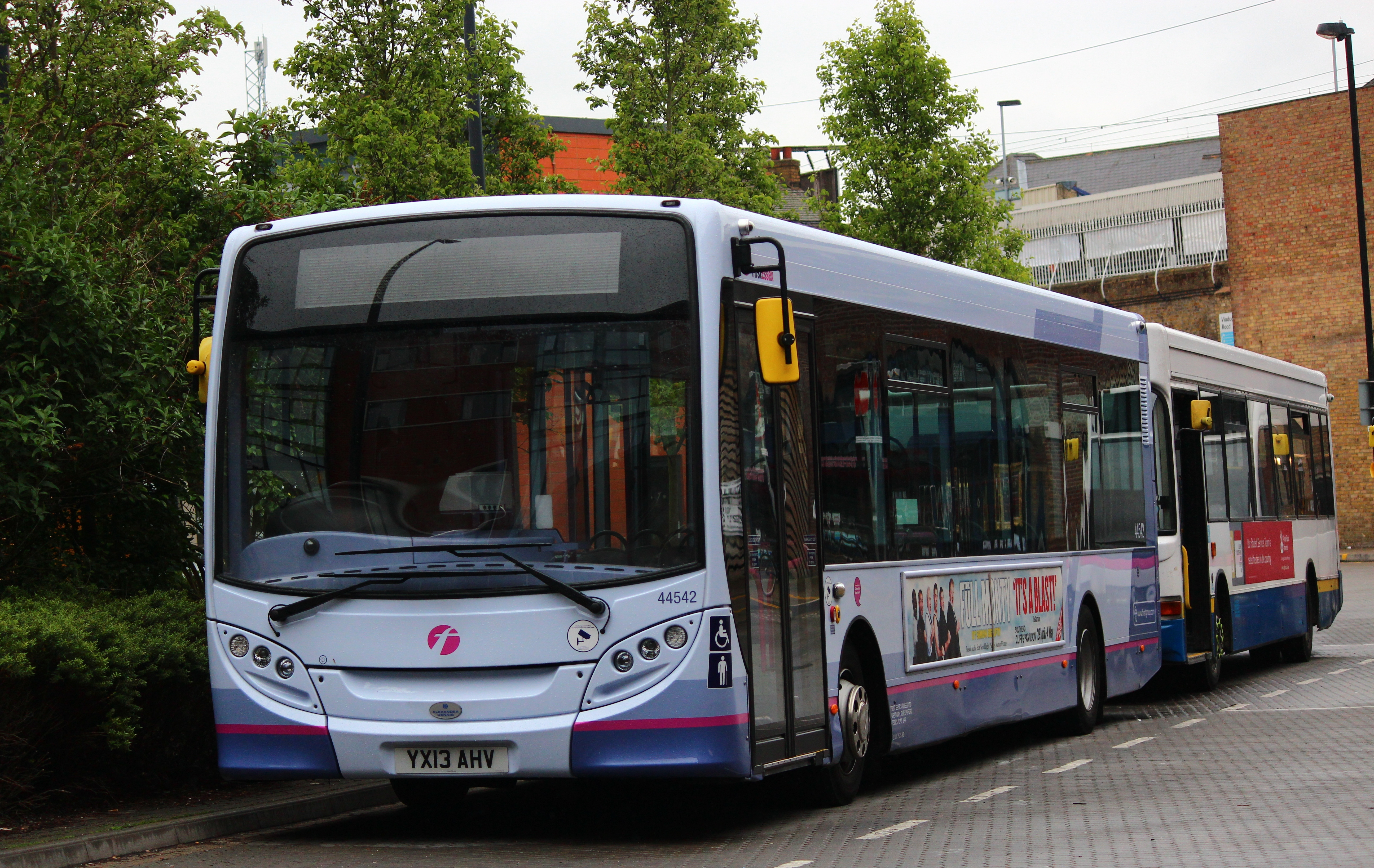 First Essex - 44542 - YX13 AHV